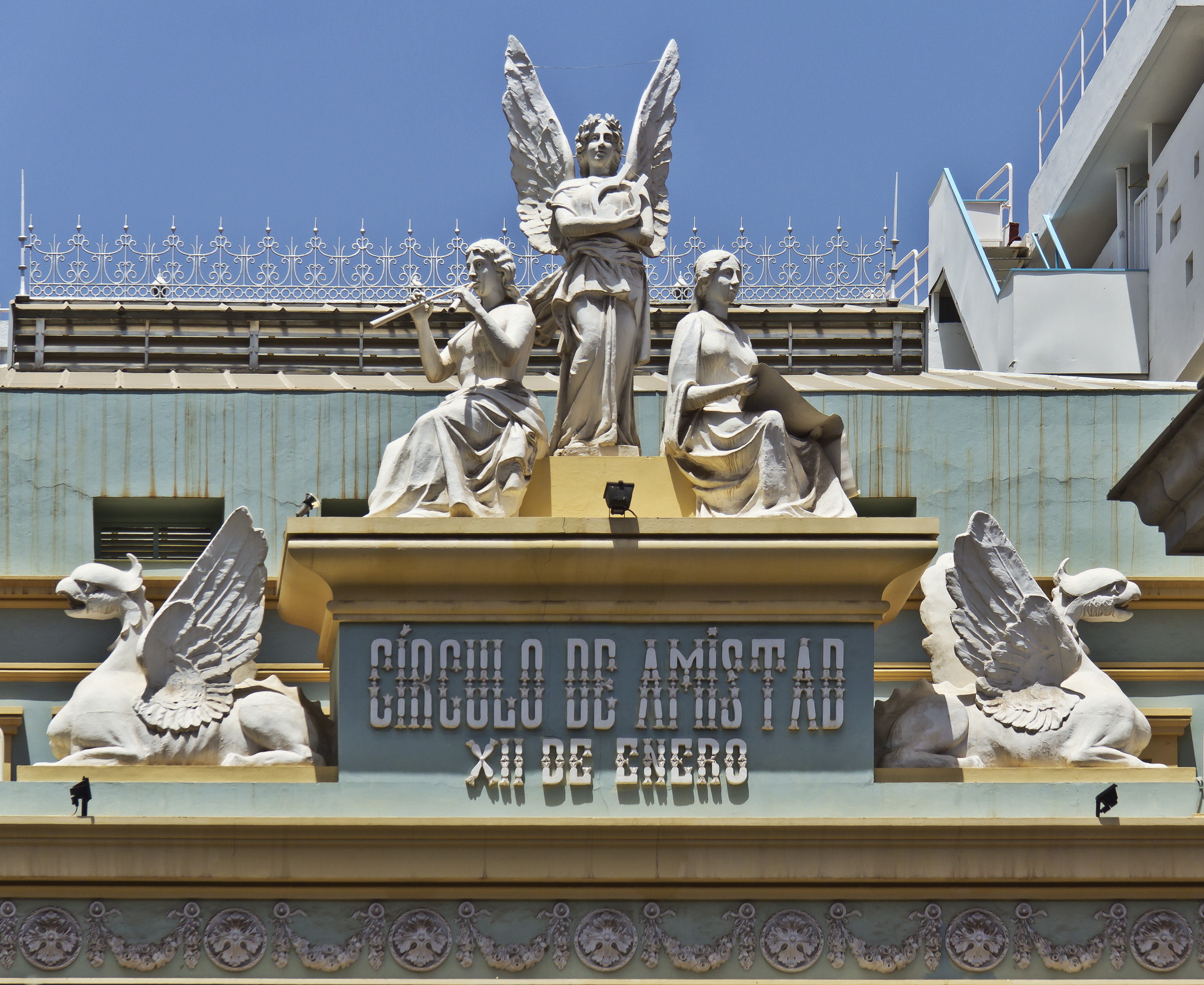 Das Gebäude des Círculo de Amistad XII de Enero wurde von dem Architekten Mariano Estanga y Arias Girón im Jahr 1904 entworfen. Es wurde von verschiedenen anderen Architekten verändert. Das Gebäude befindet sich in der Calle Ruiz de Padron in Santa Cruz de Tenerife direkt an der Plaza del Principe de Asturias.